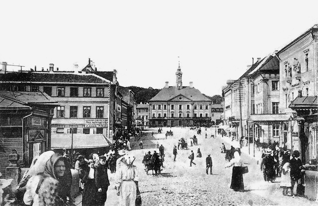 Tartu raekoja plats